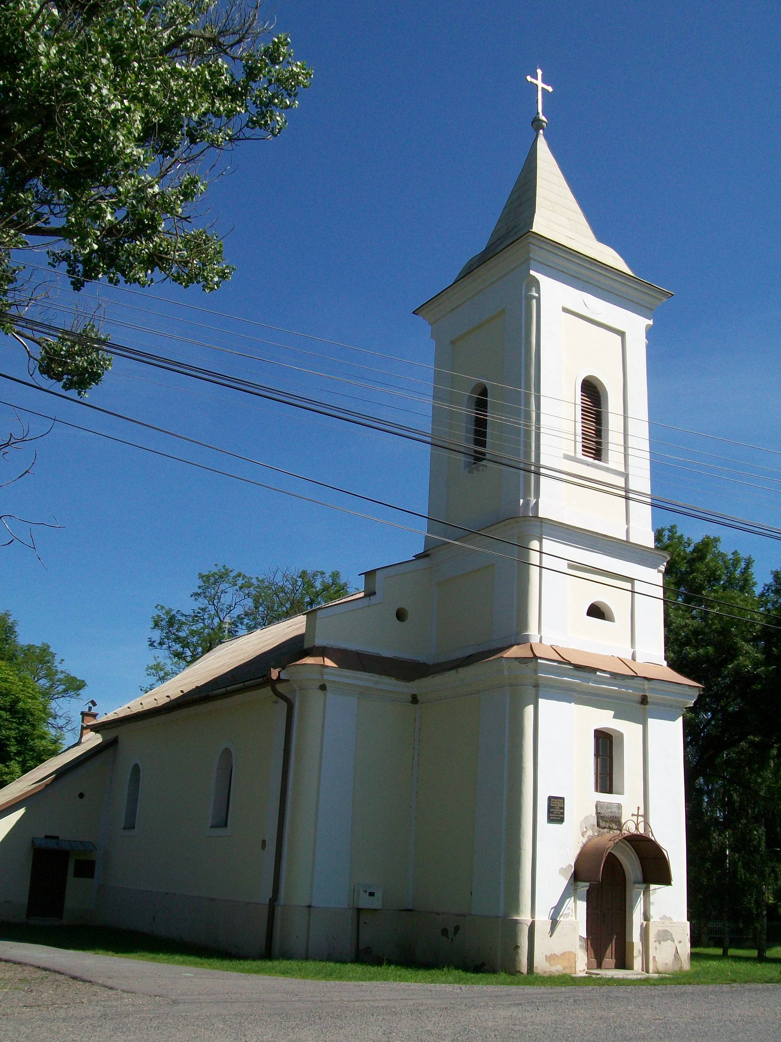 Rímsko-katolícky barokovo-klasicistický kostol z roku 1823 v Nitre nad Ipľom